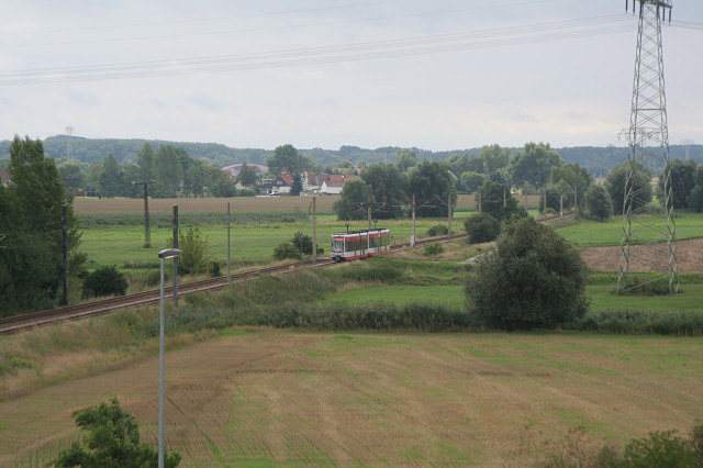 Straßenbahn der Halleschen Verkehrsaktiengesellschaft (HAVAG) (vermutlich Linie 5) bei Daspig, Leuna, Deutschland